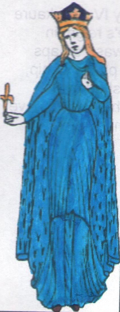 Prikaz kraljice Margarete Burbonske